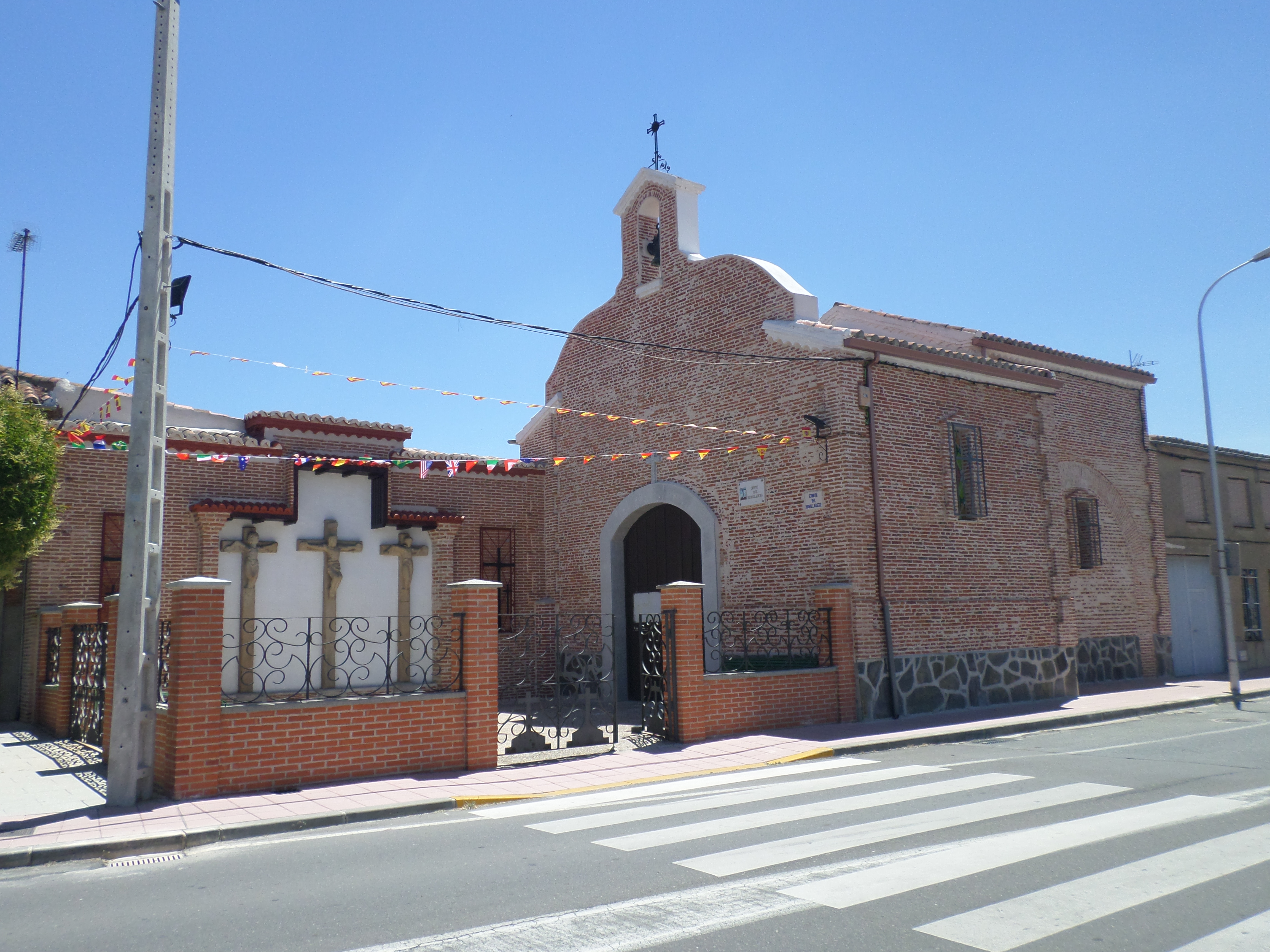 Ermita del Humilladero